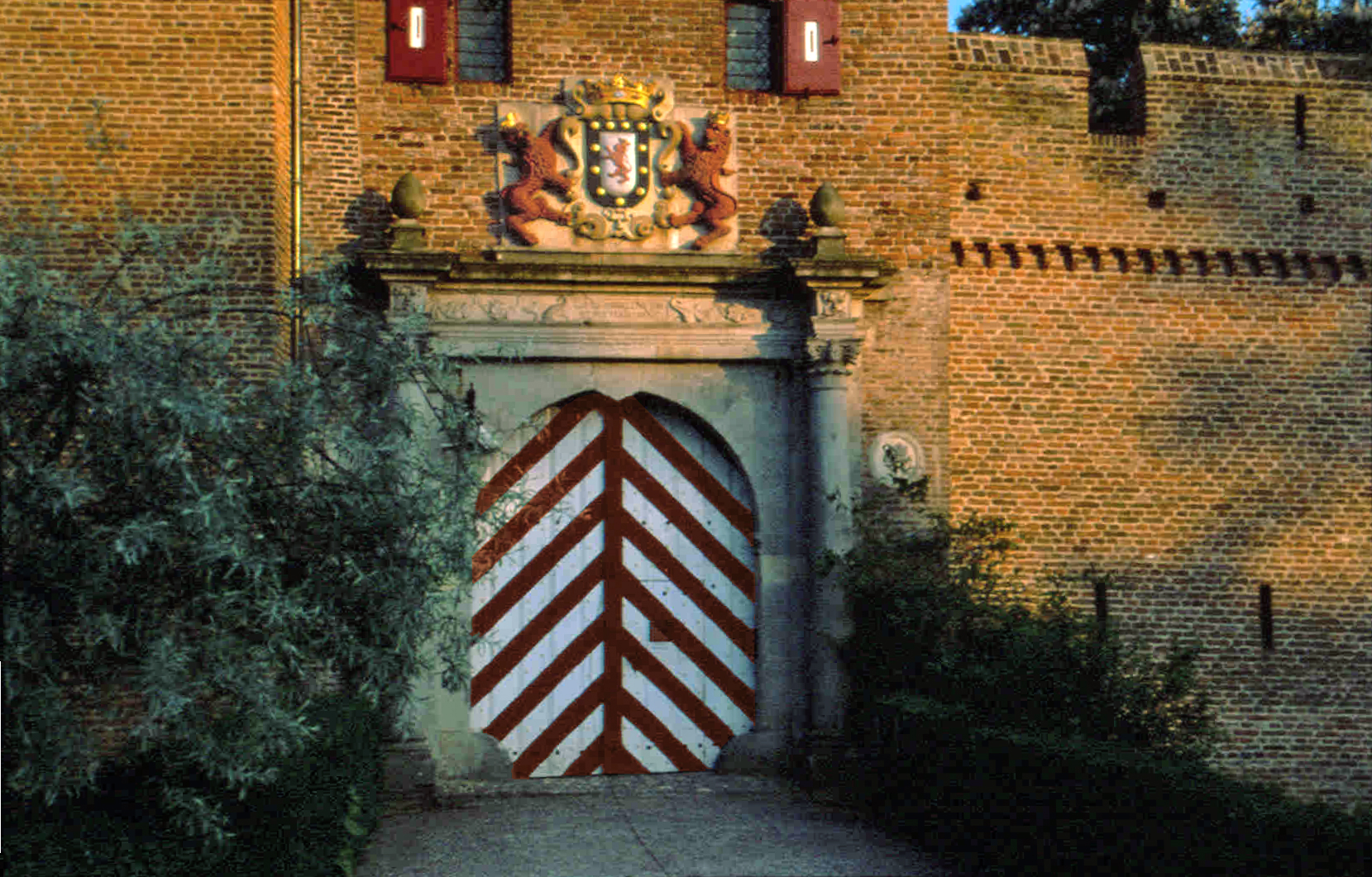 eigen foto 2002